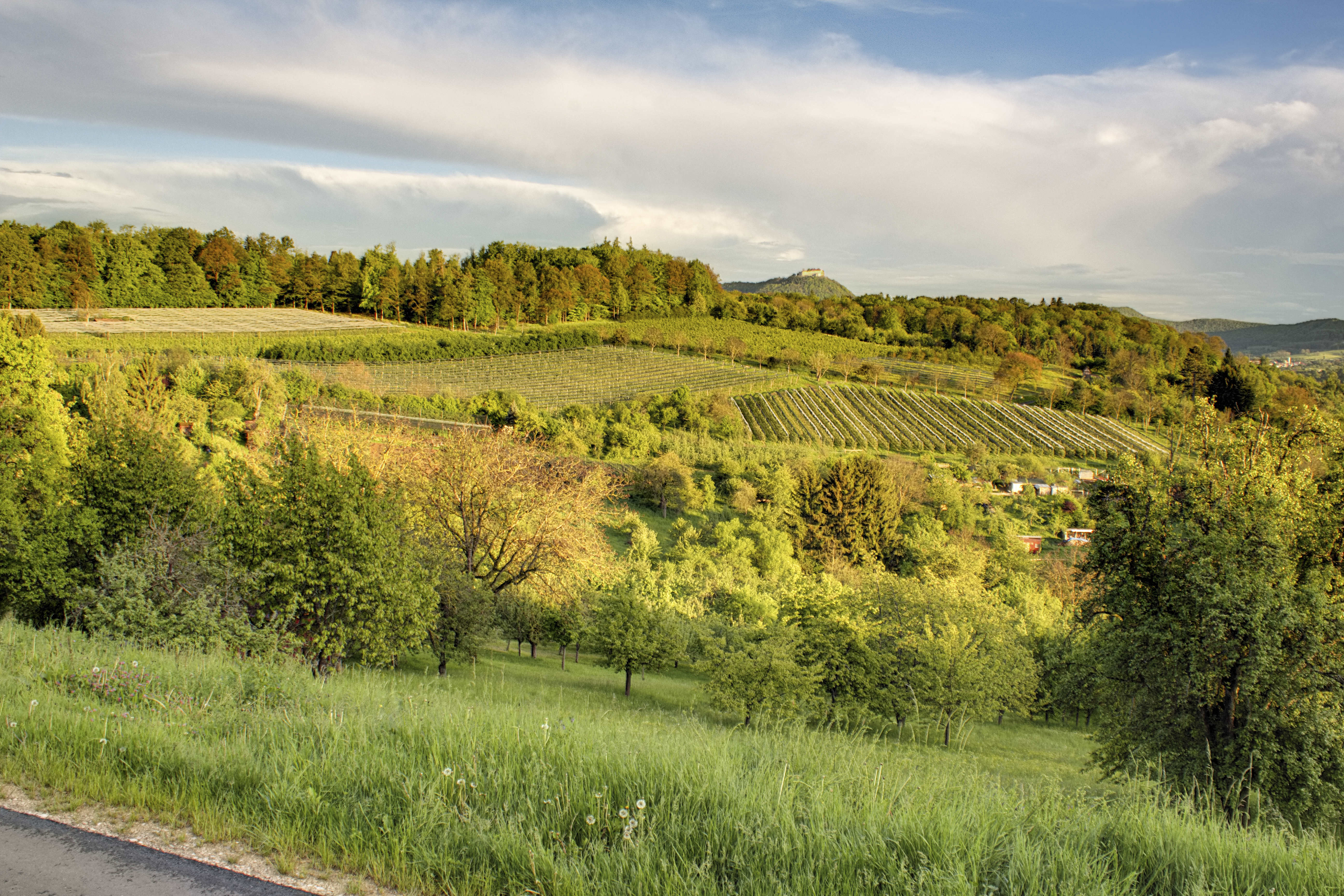 Das sind die Streuobstwiesen in Frickenhausen mit der Burg Hohenneuffen im Hintergrund.